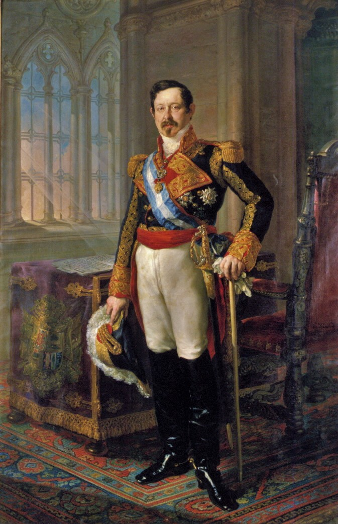 Retrato del militar y y político español Ramón María Narváez (1800-1868), capitán general del ejército español, primer duque de Valencia, Grande de España y presidente del Consejo de Ministros de España en varias ocasiones durante el reinado de Isabel II. El título de duque de Valencia le fue concedido por Isabel II el día 18 de noviembre de 1845, y el retratado aparece vistiendo el uniforme de gala de capitán General, y ostentando sobre la casaca el collar de la Orden del Toisón de Oro, y las cruces y bandas de las órdenes de Carlos III, San Fernando y Alcántara. Se dispone de pie, delante de la mesa cubierta con un tapete de terciopelo en el que está bordado el blasón heráldico de su ducado. Este retrato, fechado y firmado por Vicente López en 1849, fue el último cuadro realizado por el pintor, y es una réplica del que se conserva en el Palacio Real de Madrid.